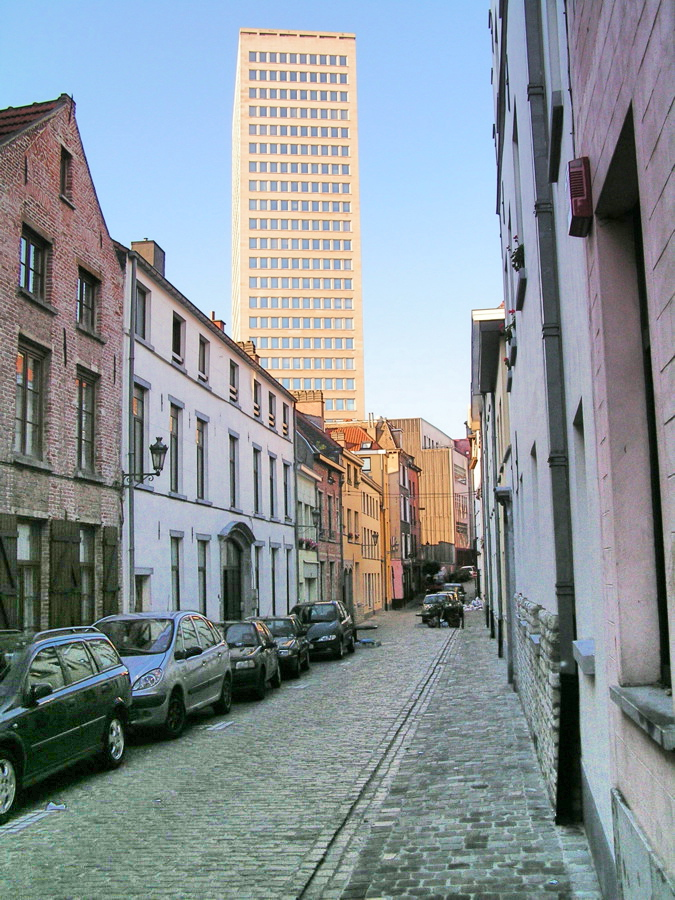 Sujet : Bruxelles, bruxellisation de la rue de la Samaritaine. Photo : © Roby